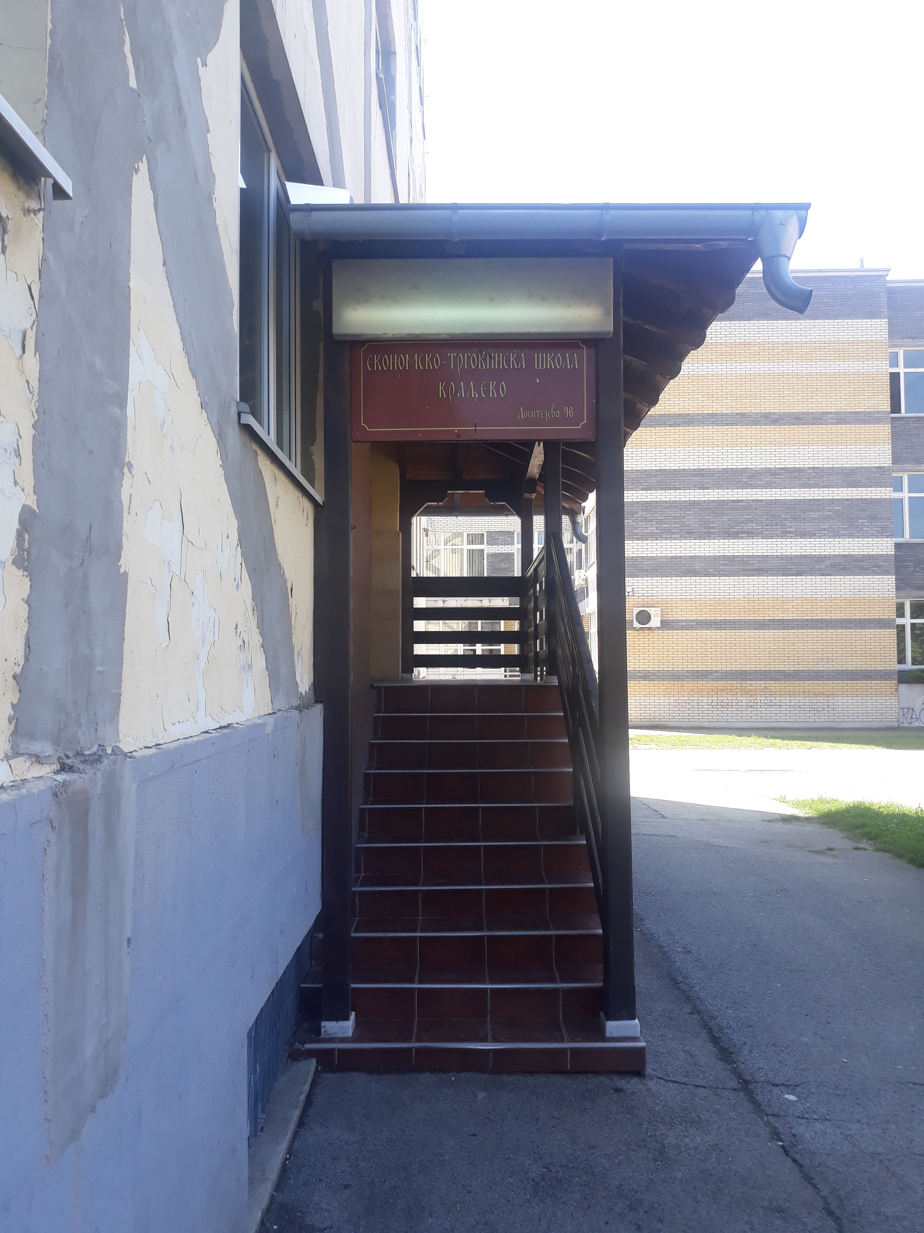 Економско-трговинска школа Краљево